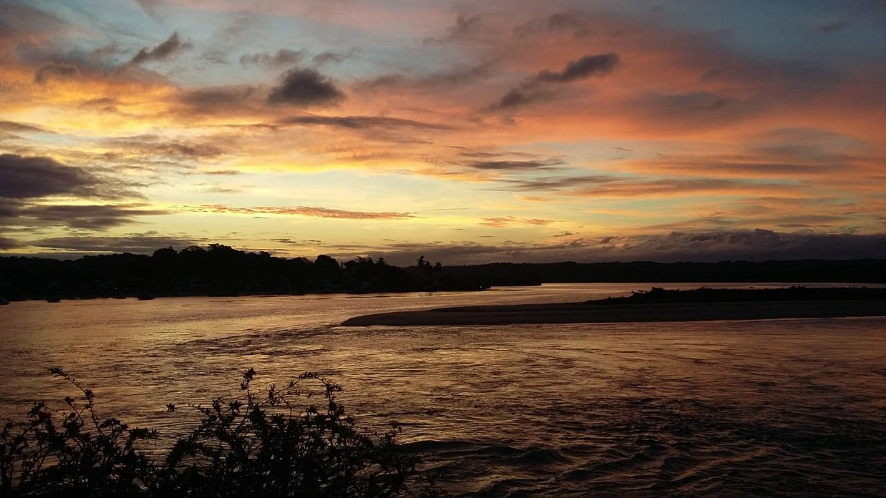 Praia da Concha , encontro do mar com o Rio de Contas